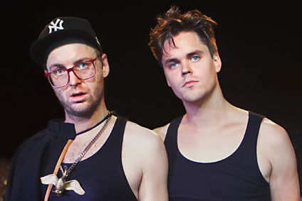 Maskinen 2011.